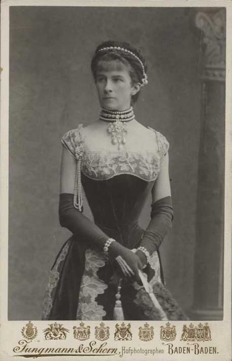 Mathilde, Prinzessin in Bayern-Birkenfeld Beschreibung Bildnis in mittleren Jahren; in dekolletierter Toilette